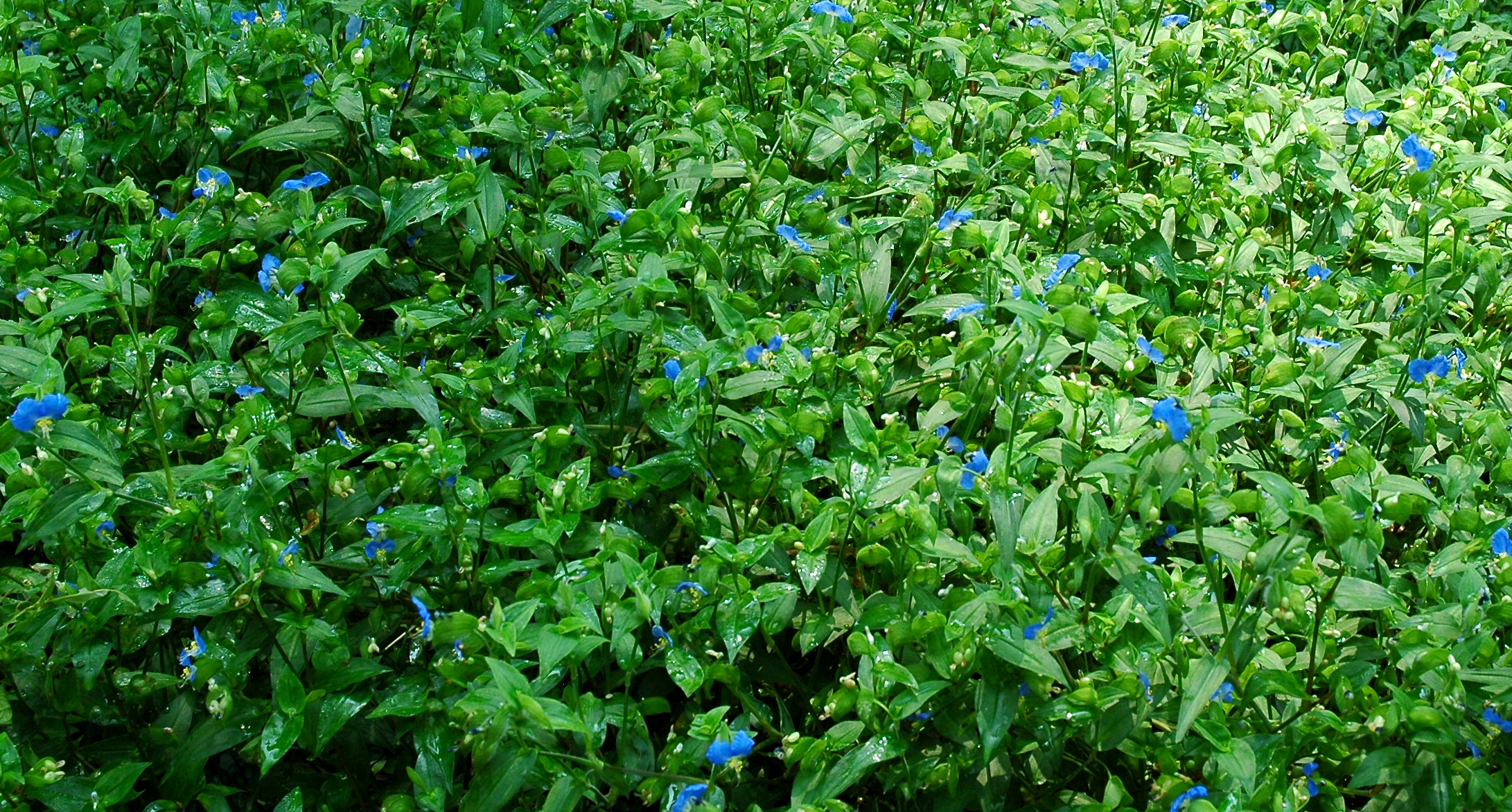 Commelina communis (ツユクサ)